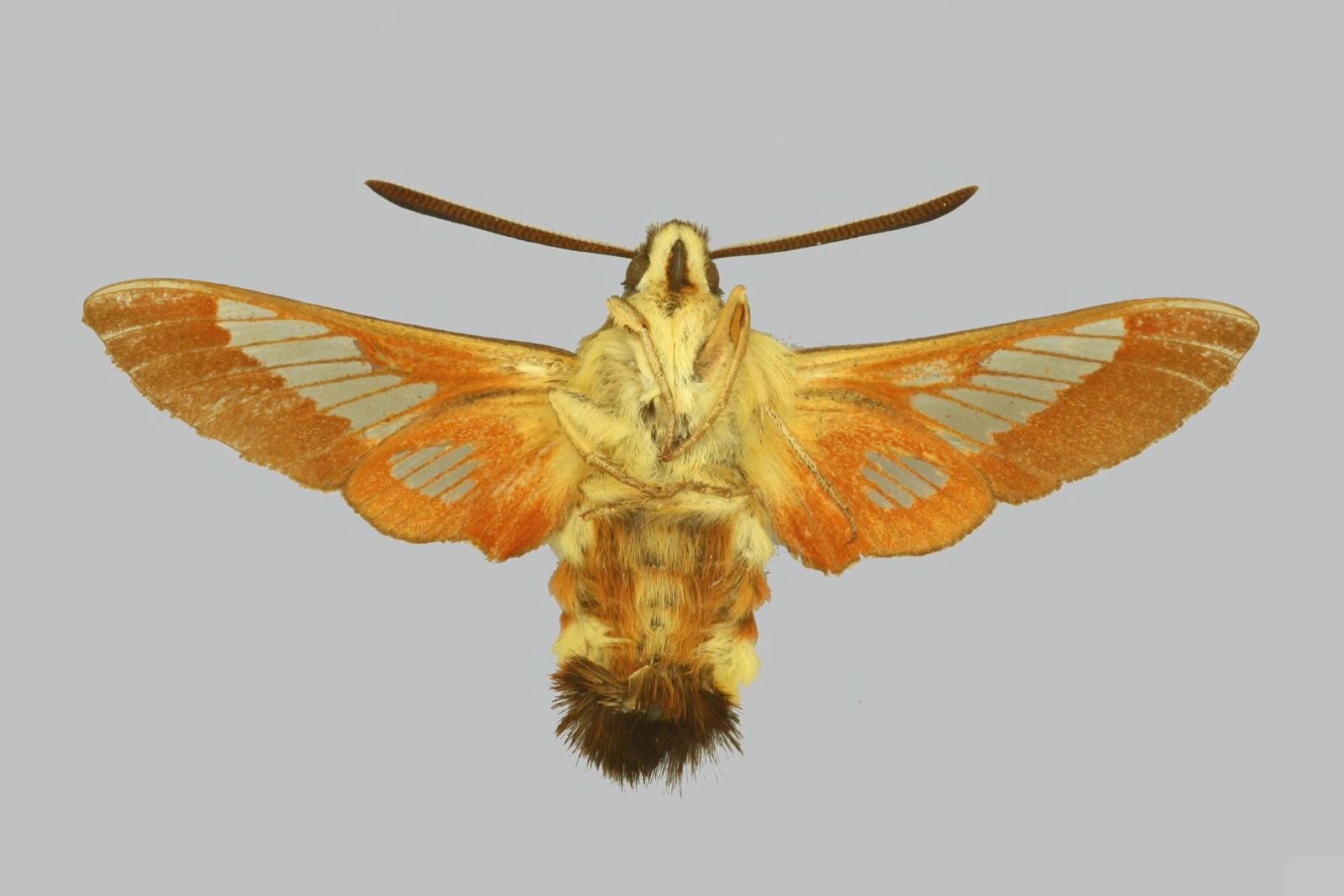 Hemaris ducalis Male underside from Afghanistan, Kuliab